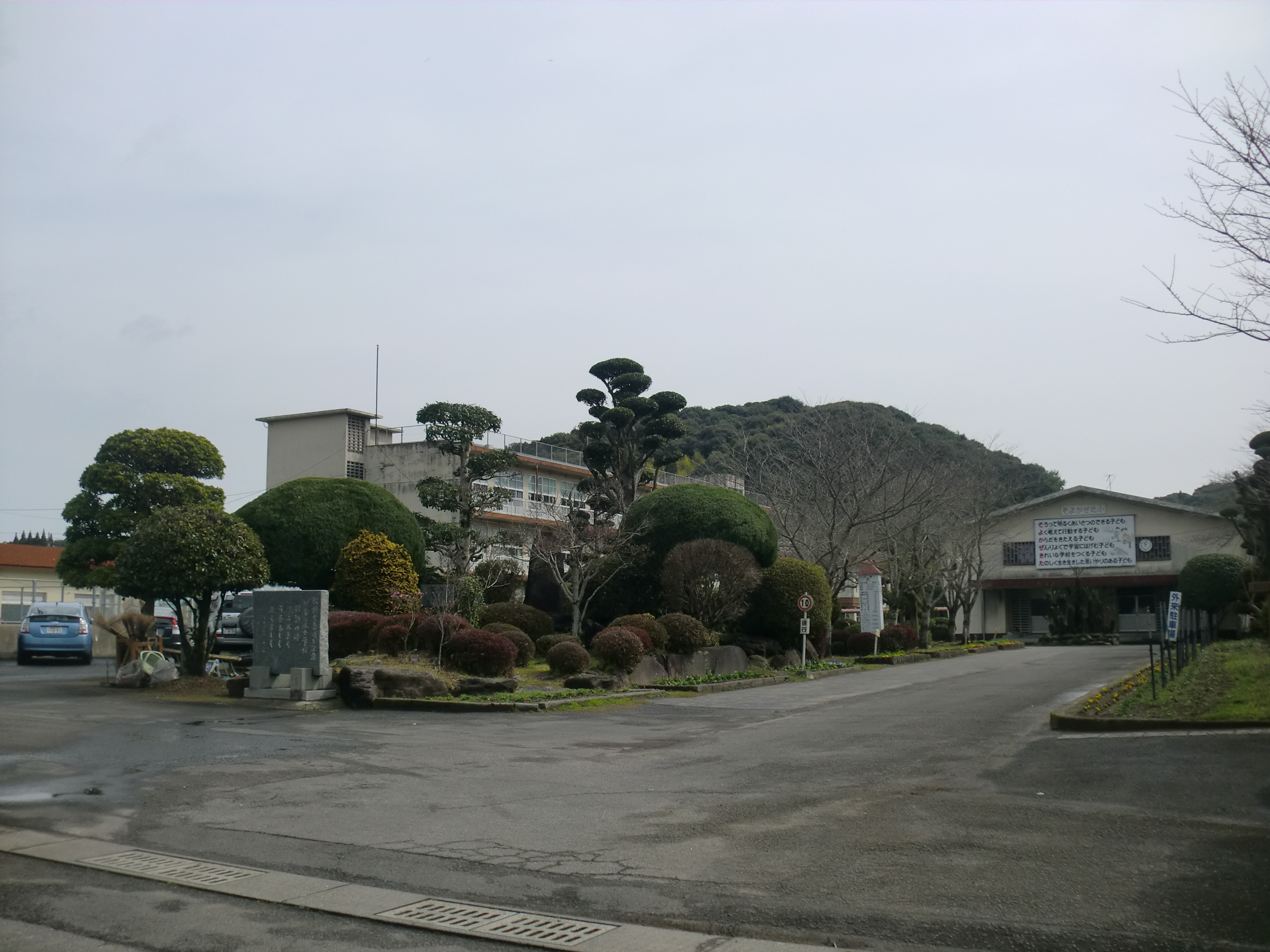 日置市にある日置市立伊集院北（いじゅういんきた）小学校